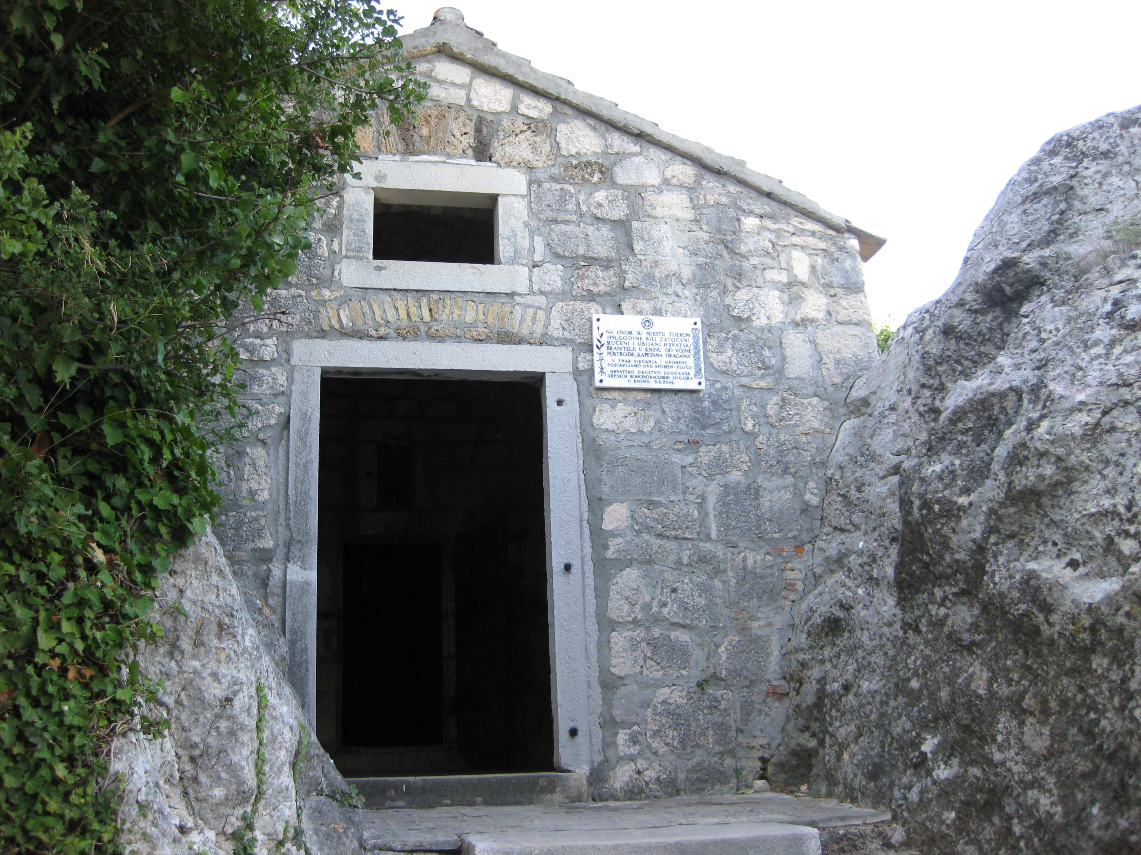 Mjesto gdje su bili zatoceni, muceni i ubijani Hrvatski branitelji od vojnih postrojbi "Kapetana Dragana" u Kninu Memorial, place where croatians were tortured, killed by serbian troops under the command of Dragan Vasilkjovic i Knin